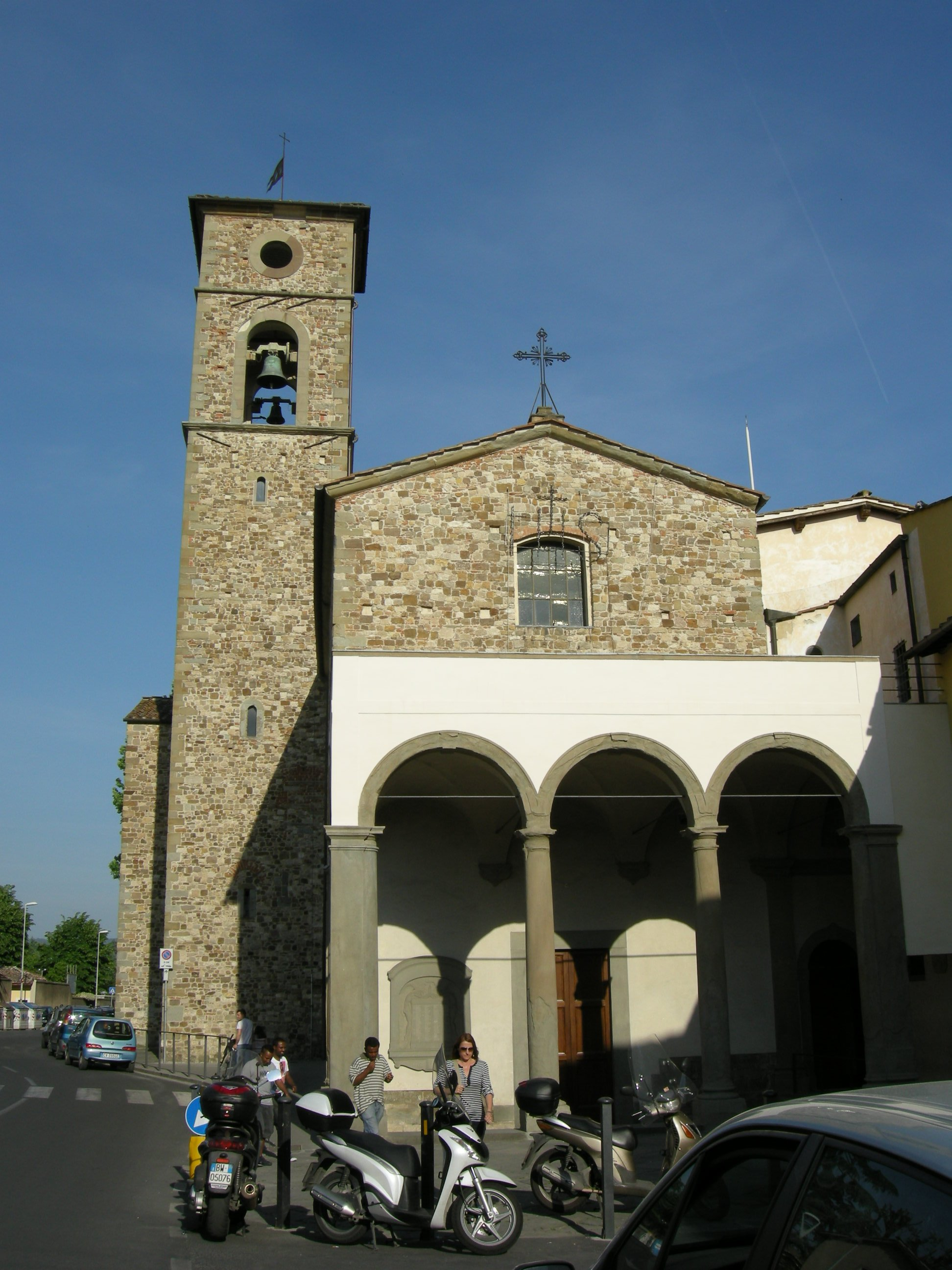 Chiesa di san salvi